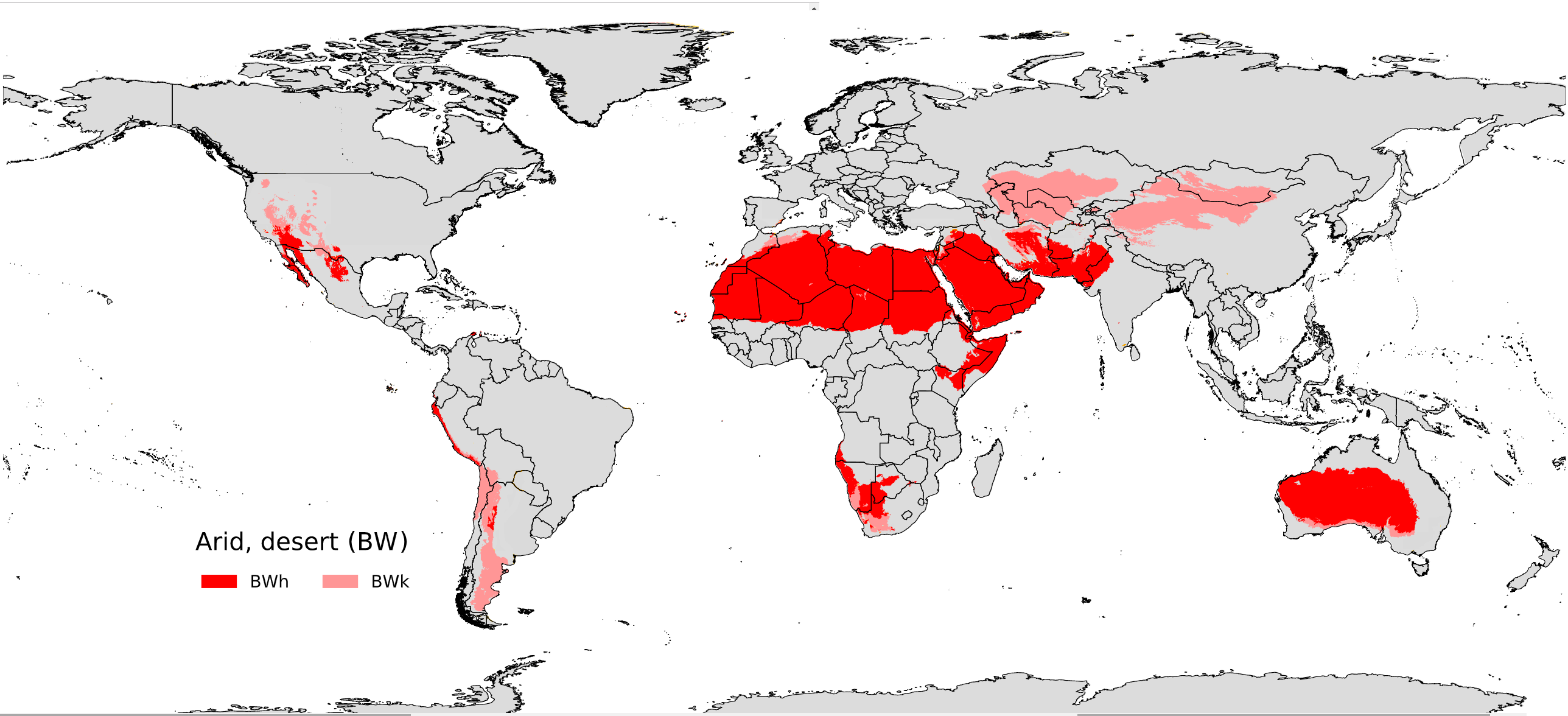 Mapa global del clima árido o desértico BW de acuerdo al sistema de Köppen-Geiger para el periodo 1980-2016